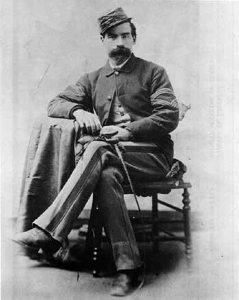 Portrait du colonel Michael McCarthy (1845-1914).